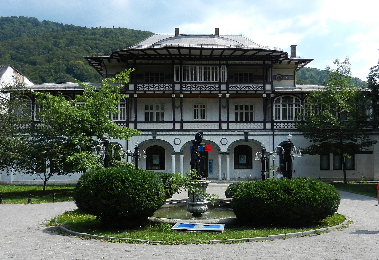 Casa Slătineanu, azi B. C. R. - filiala Sinaia